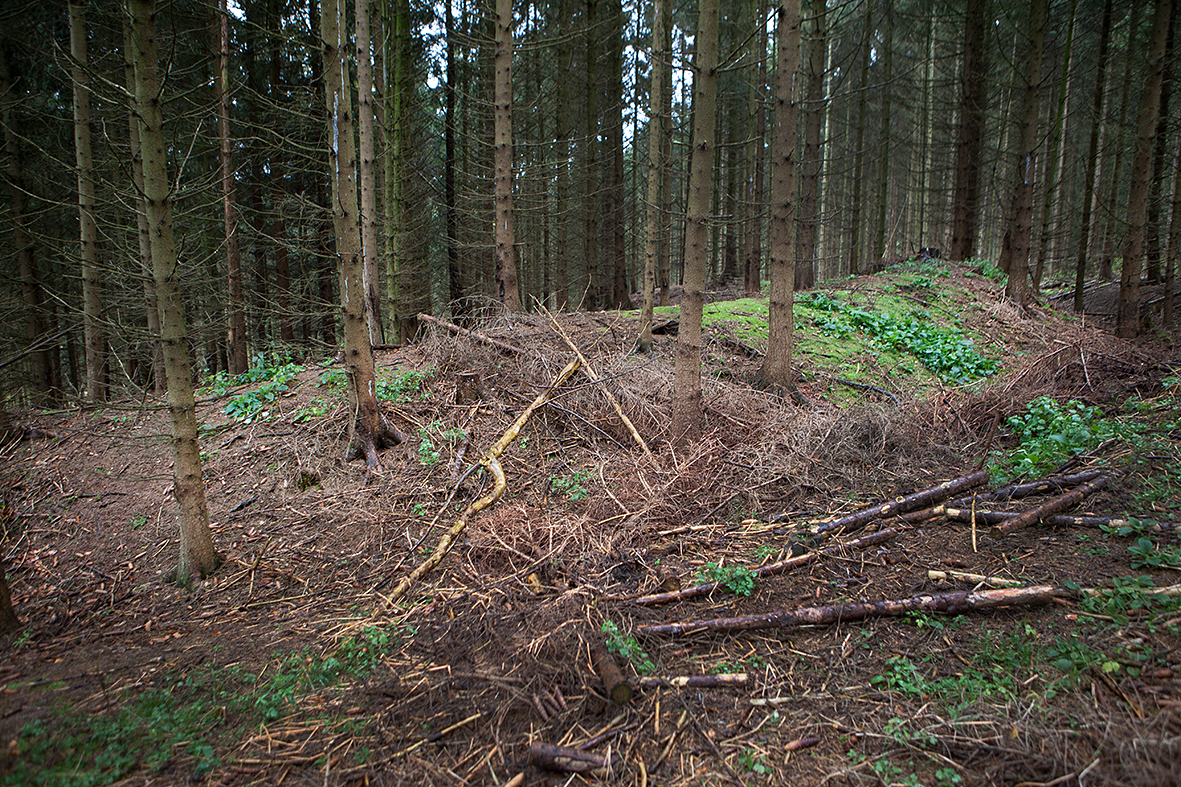 Reste des Ringwalles Bomhof bei Lügde, Kreis Lippe, Nordrhein-Westfalen